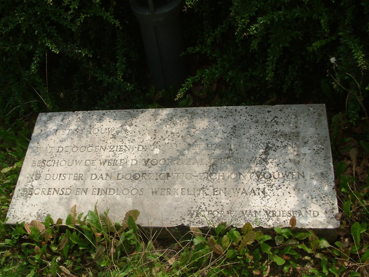 Panta Rhei, kunstwerk (en fontein) van Hubert van Lith met teksten van Victor E van Vriesland, op de hoek Kastanjelaan-Essenstraat-Frederiklaan in Eindhoven